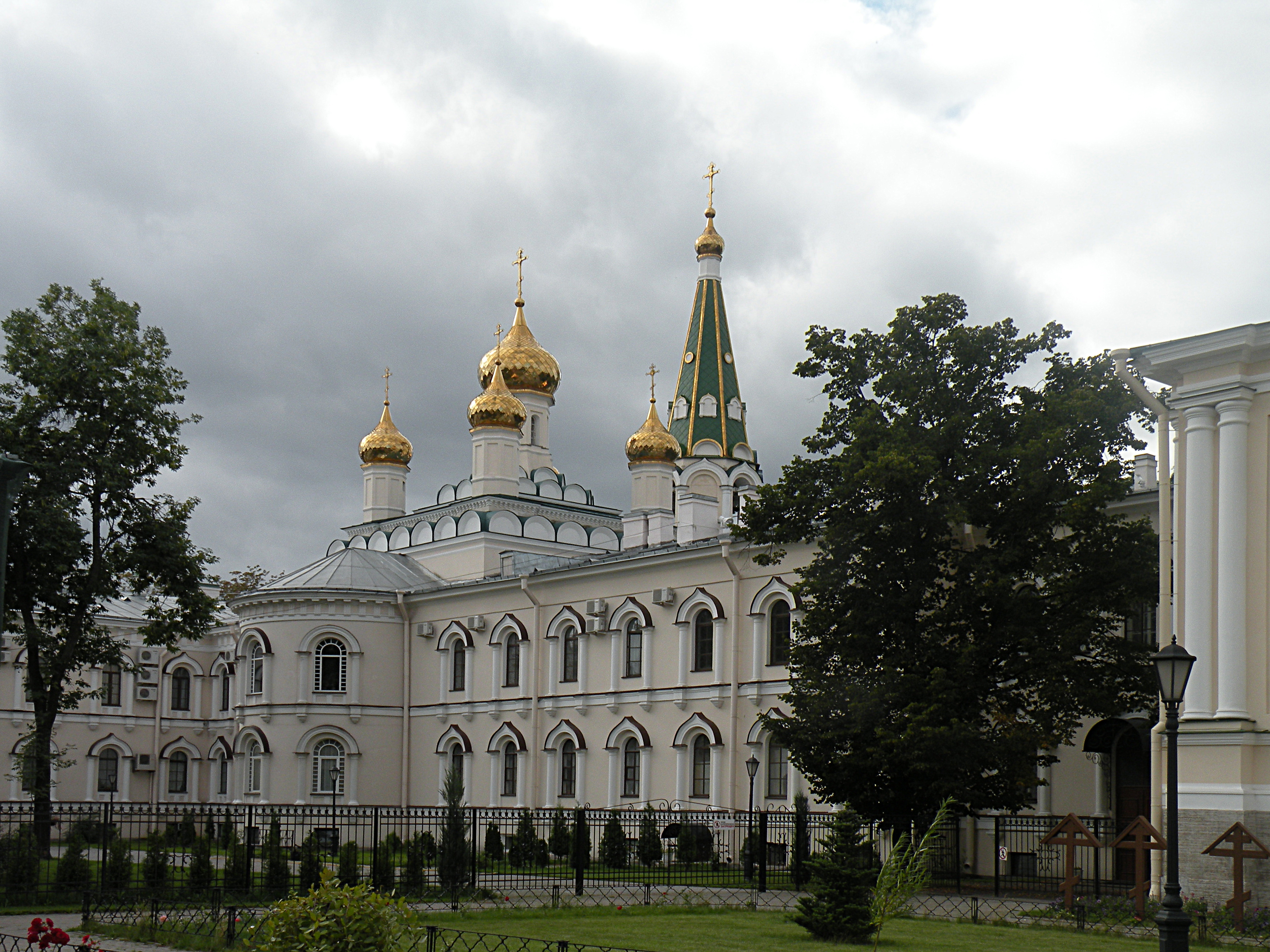 Собор Ново-девичьего монастыря